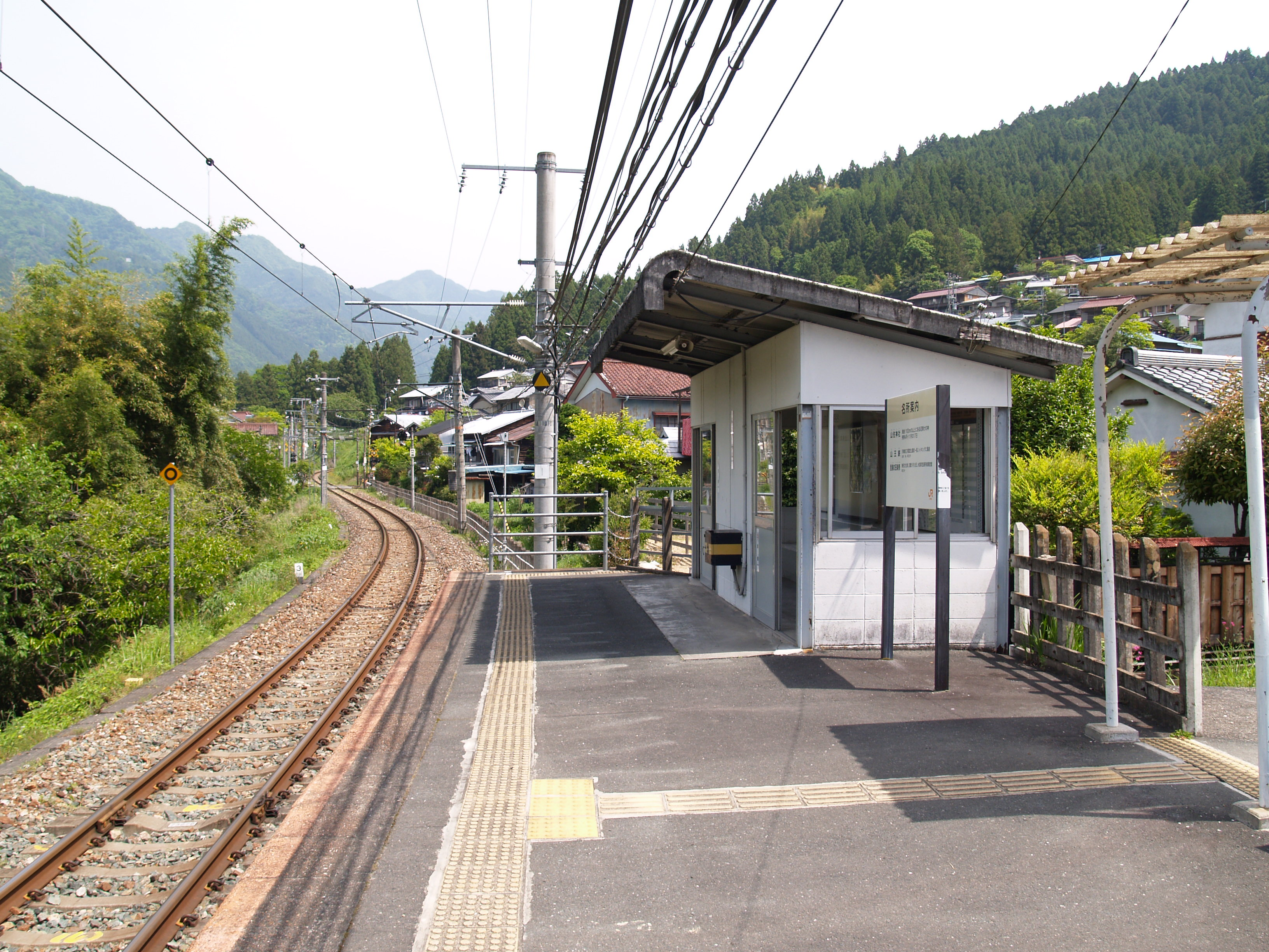 向市場駅待合室。